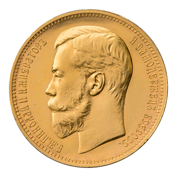 37 рублей 50 копеек — 100 франков 1902 г. (аверс). Биткин 315 (R2). Профильный портрет императора, влево. Круговая надпись: Б. М.НИКОЛАЙ II ИМПЕРАТОРЪ И САМОДЕРЖЕЦЪ ВСЕРОСС. Зубчатый ободок по краю.